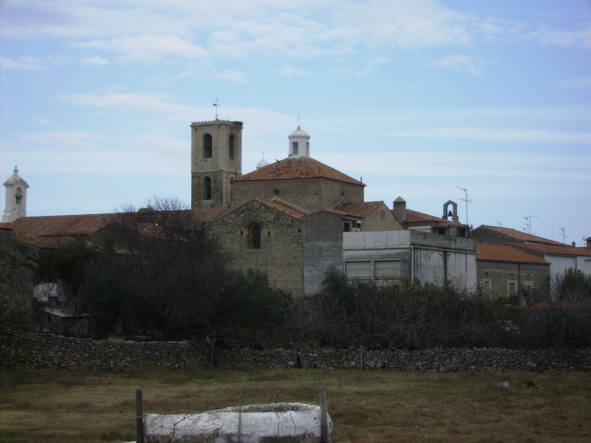 Vista trasera de la iglesia de Huertas de Ánimas (Trujillo, provincia de Cáceres, España) y las casas y huertos que la rodean